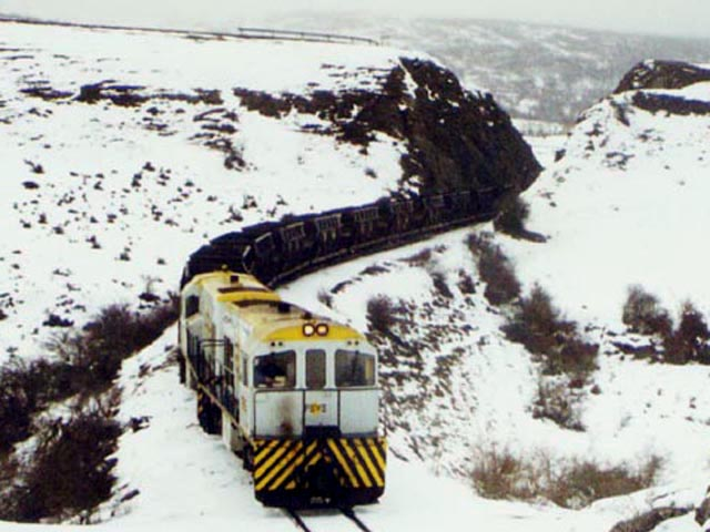 GECo´s 1504 y 1502 con un tren de carbón térmico saliendo de la trinchera de los Navarros tras la nevada.